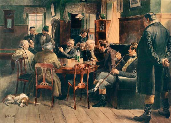 Johann Bahr Stammtisch in Neubrandenburg 1899